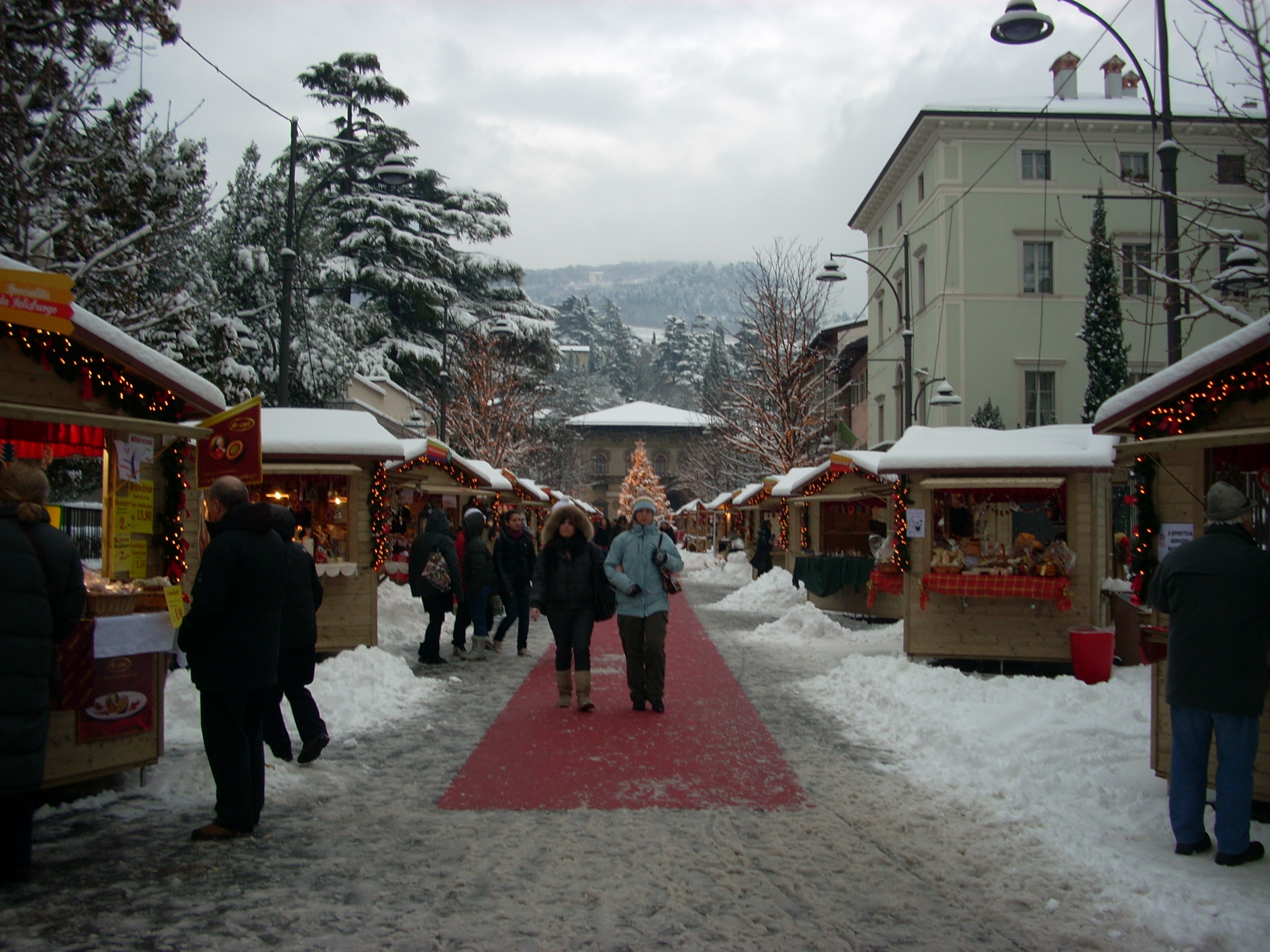 Mercatino di Natale di Rovereto, su Corso Rosmini, dicembre 2009. L'edificio sulla destra, di colore verde, è la casa natale di Antonio Rosmini